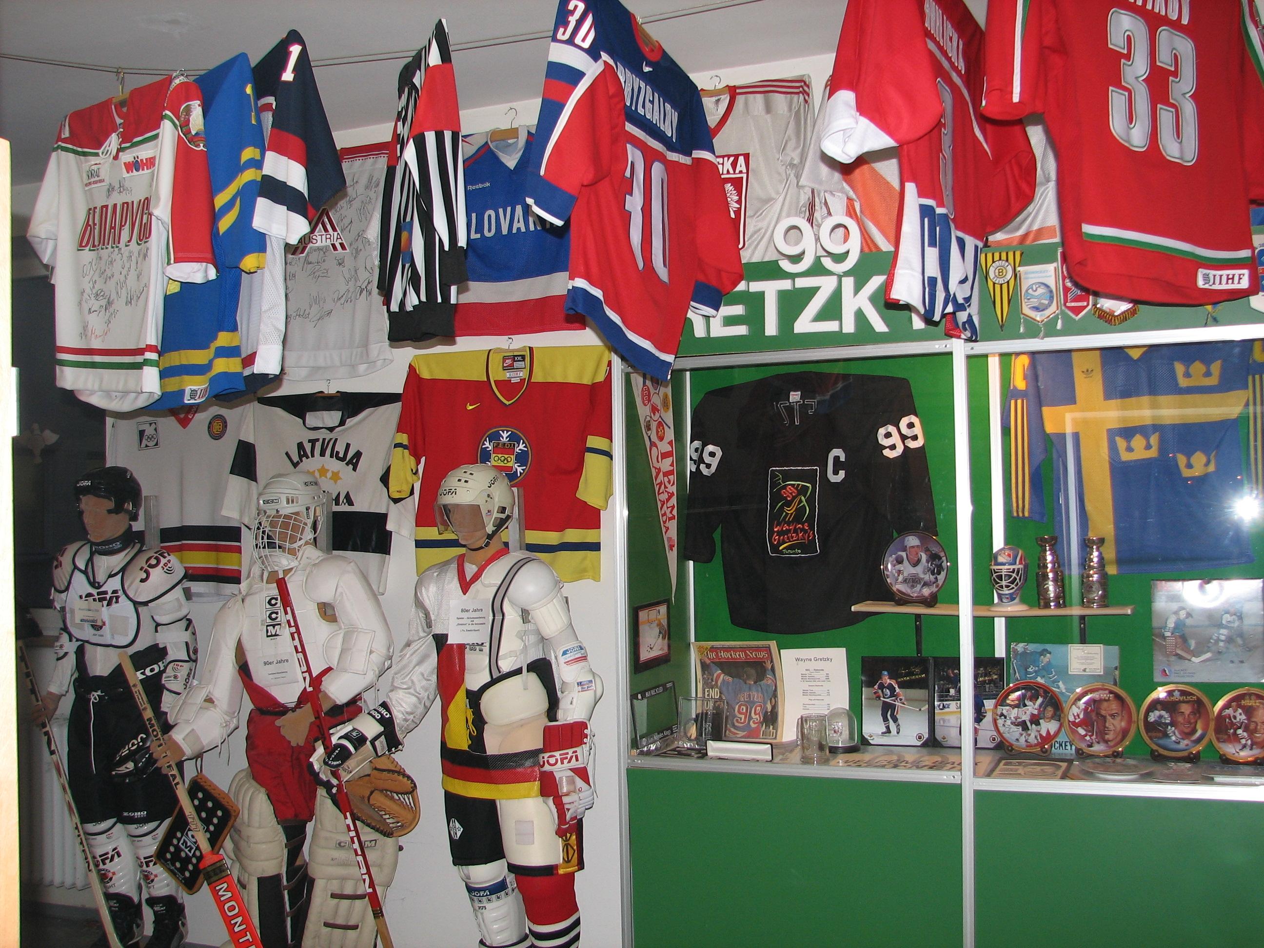 Ausstellungsraum im Eishockeymuseum